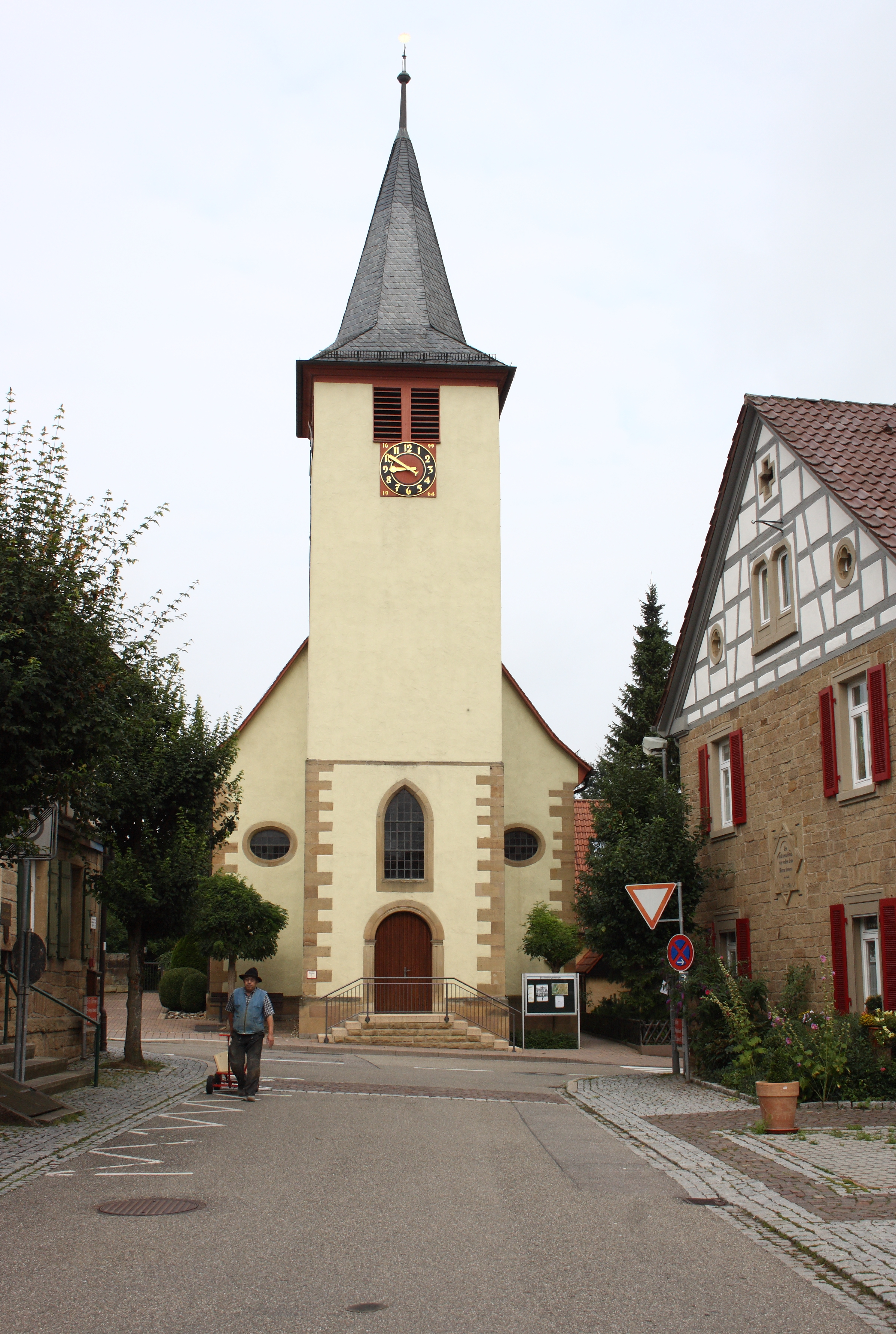 evangelische Kirche in Großvillars, Heilbronner Straße 21, Blickrichtung West auf der Freudensteiner Straße